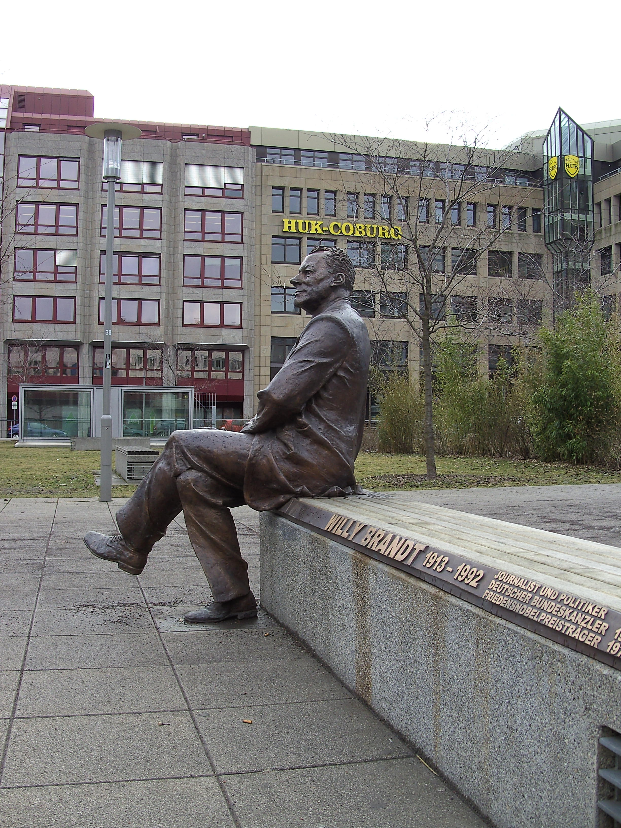 Willy-Brandt-Denkmal Nürnberg, Bildhauer Josef Tabachnyk, Bronze, 2009